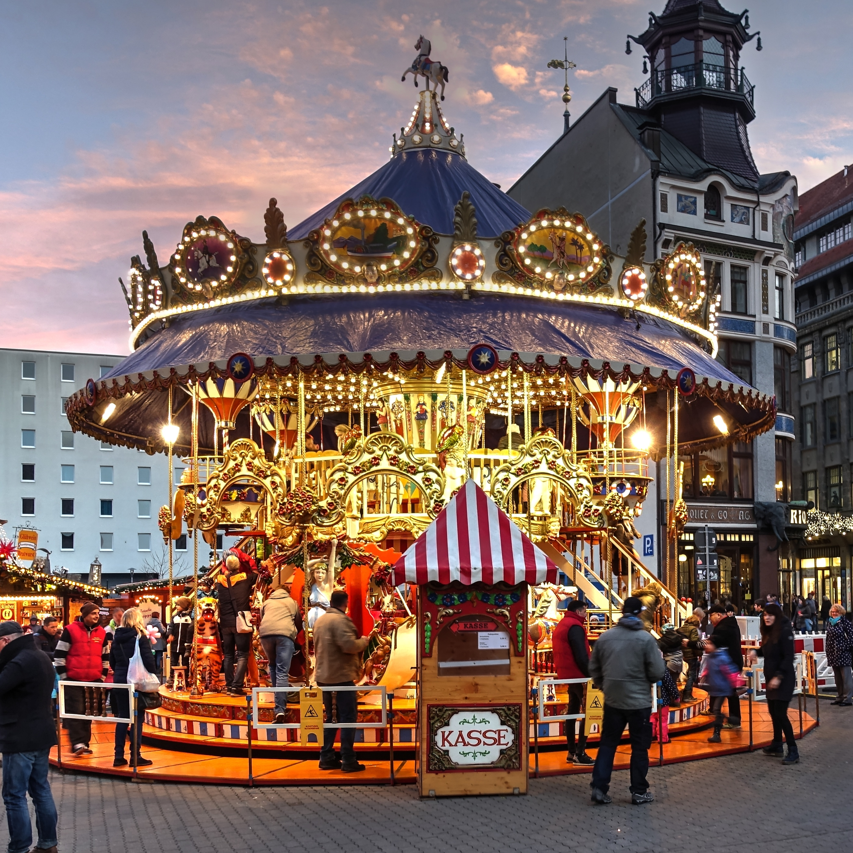 Der Weihnachtsmarkt in Leipzig 2019 - historisches Etagenkarusell an der Reichsstraße Ecke Salzgäßchen